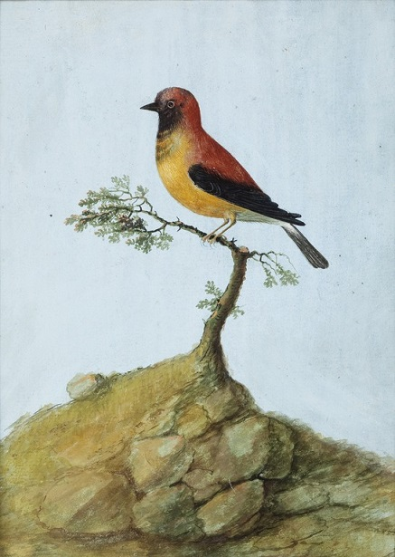 Uccello sul ramo, tempera su carta, 19 x 25 cm., Pinacoteca comunale di Faenza